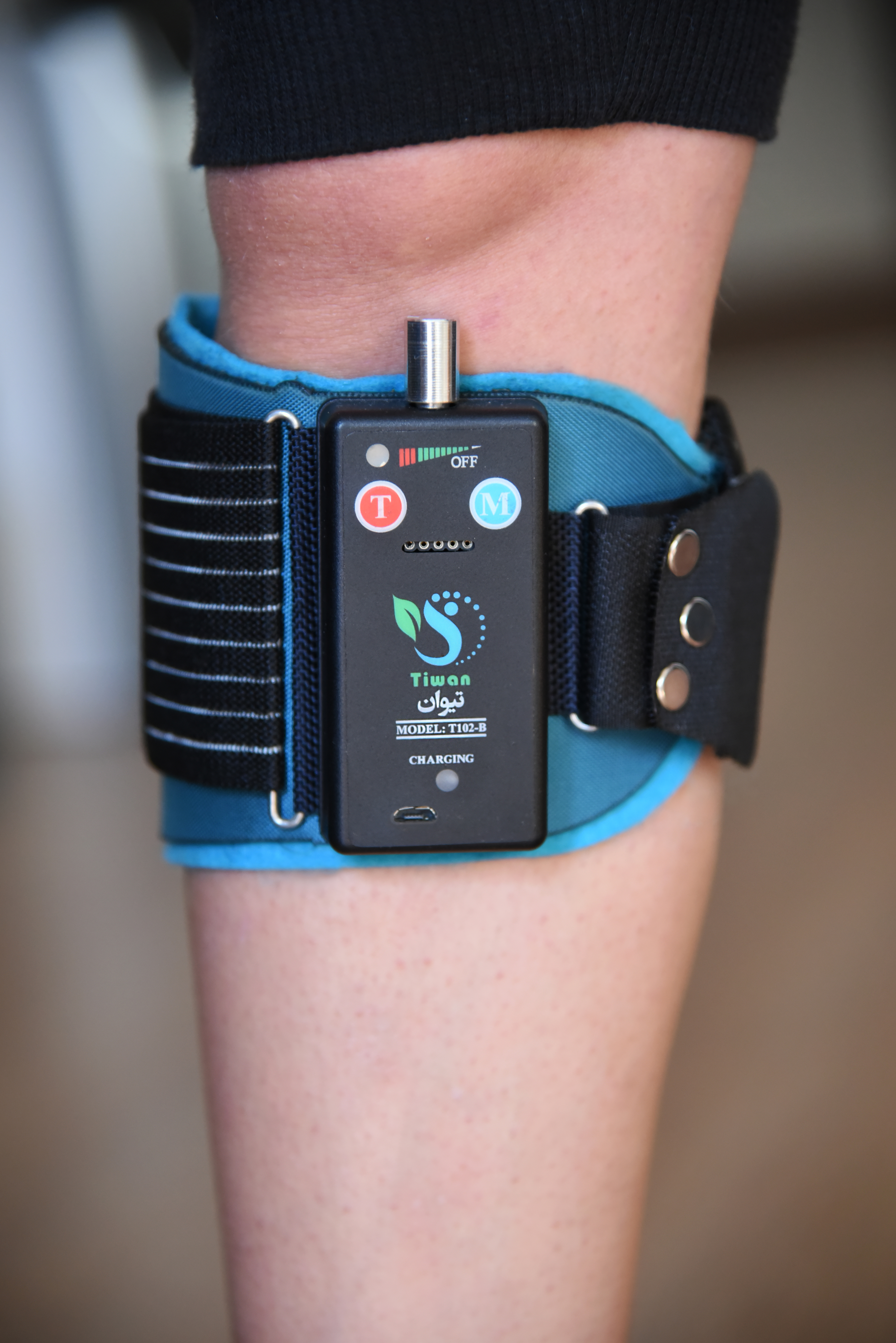 دستگاه تیوان - اصلاح الگوی راه رفتن و رفع کننده افتادگی پا و اسپاسم